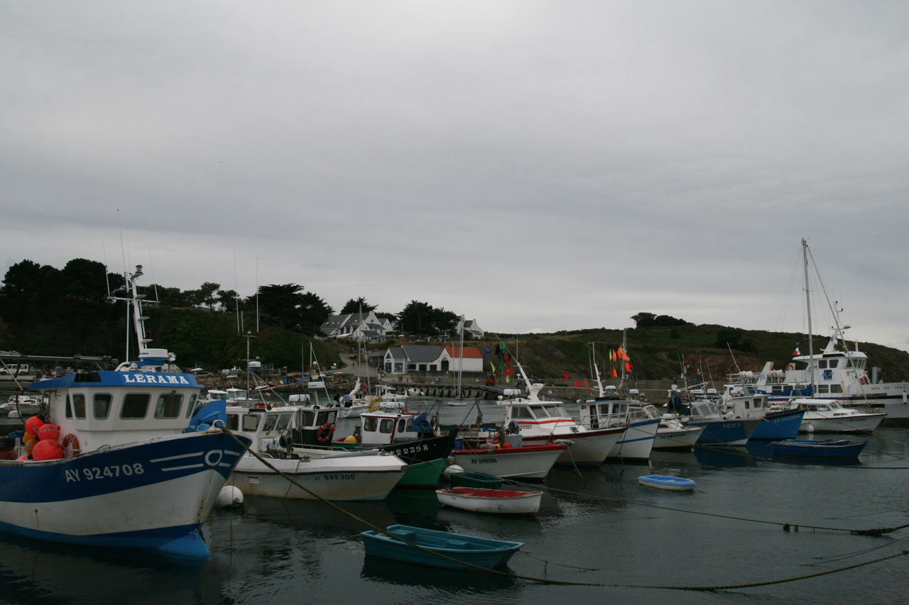 Port de Houat